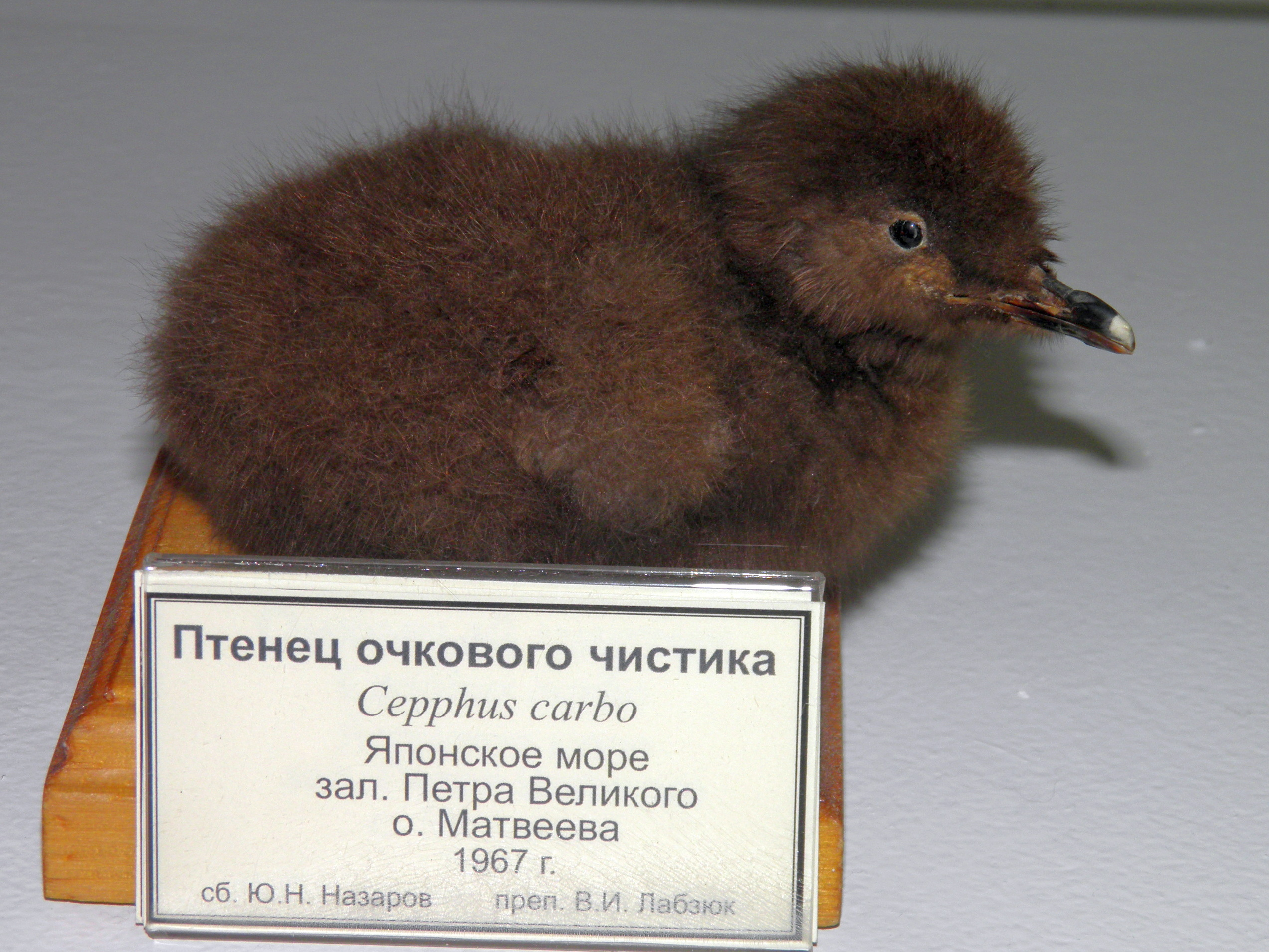 Птенец очкового чистика